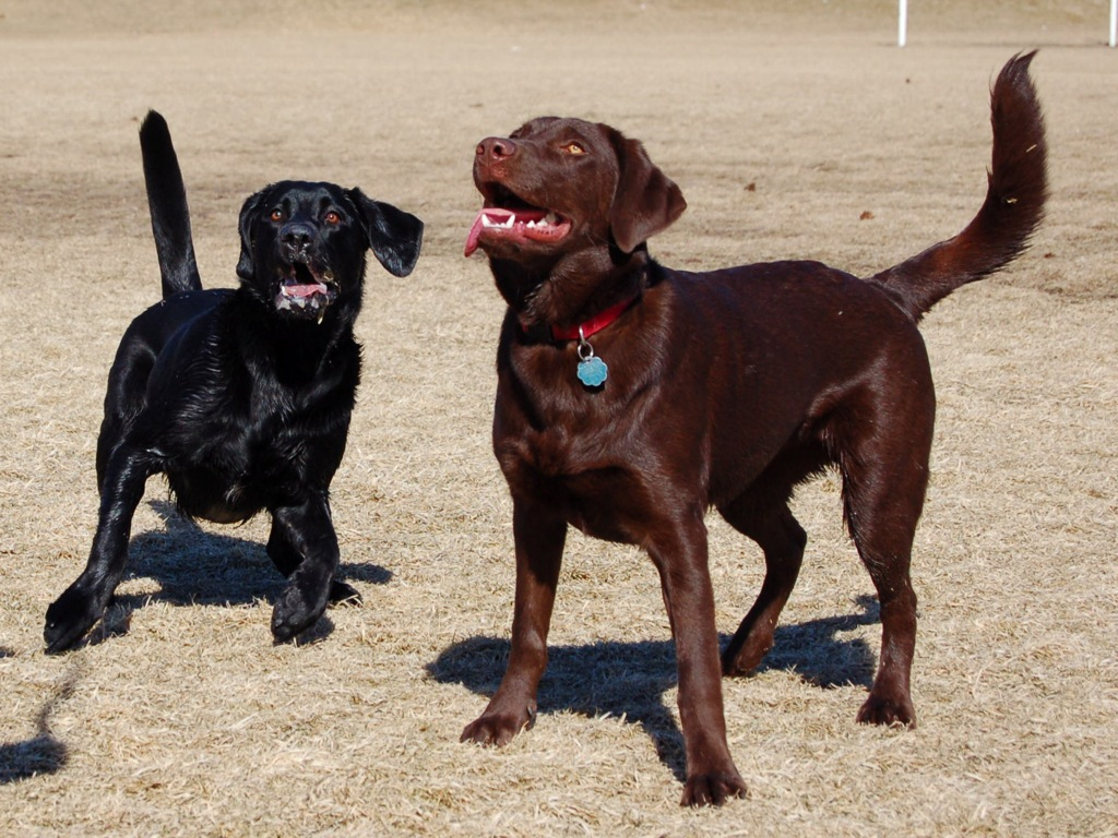 Two Labrador Retrievers